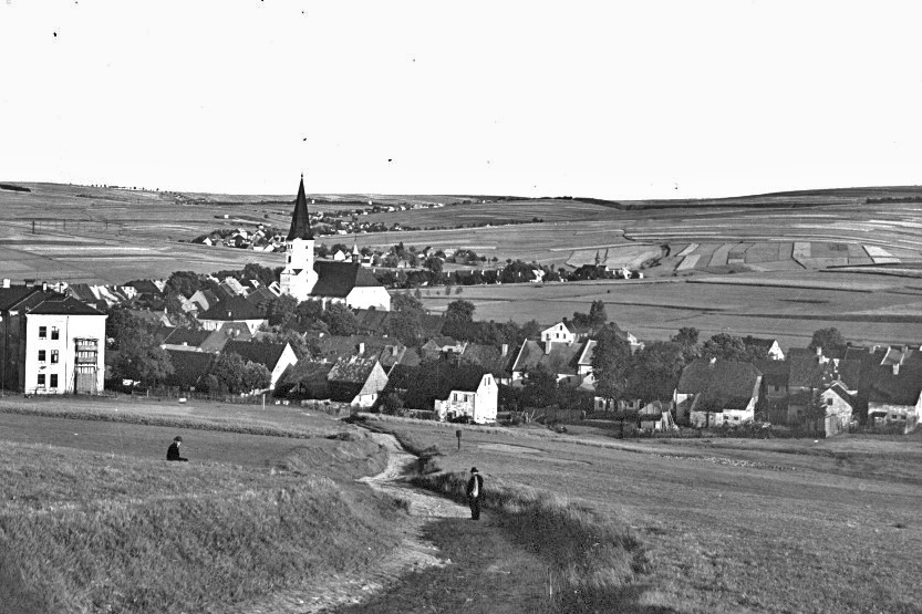 Blick über die ehemalige Königliche Bergstadt Preßnitz im Erzgebirge nach Reischdorf in Böhmen (alte Postkarte)